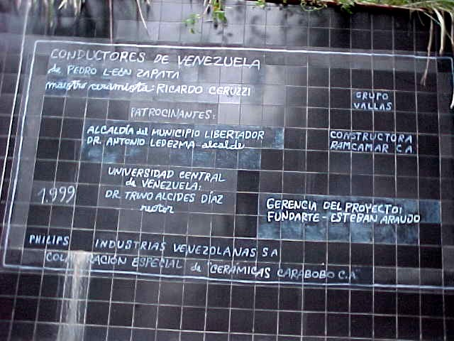 UCV-Mural Los constructores de Venezuela en el municipio Libertador, Distrito Capital - Venezuela (2000)